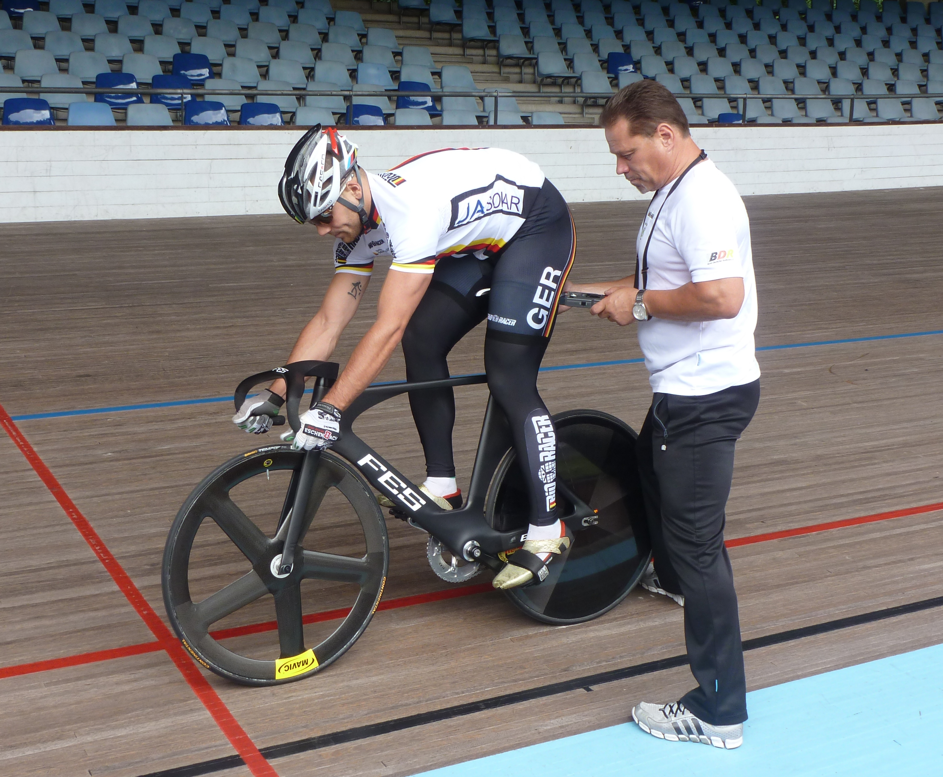 Maximilian Levy, deutscher Bahnradsportler, mit Nationaltrainer Detlef Uible